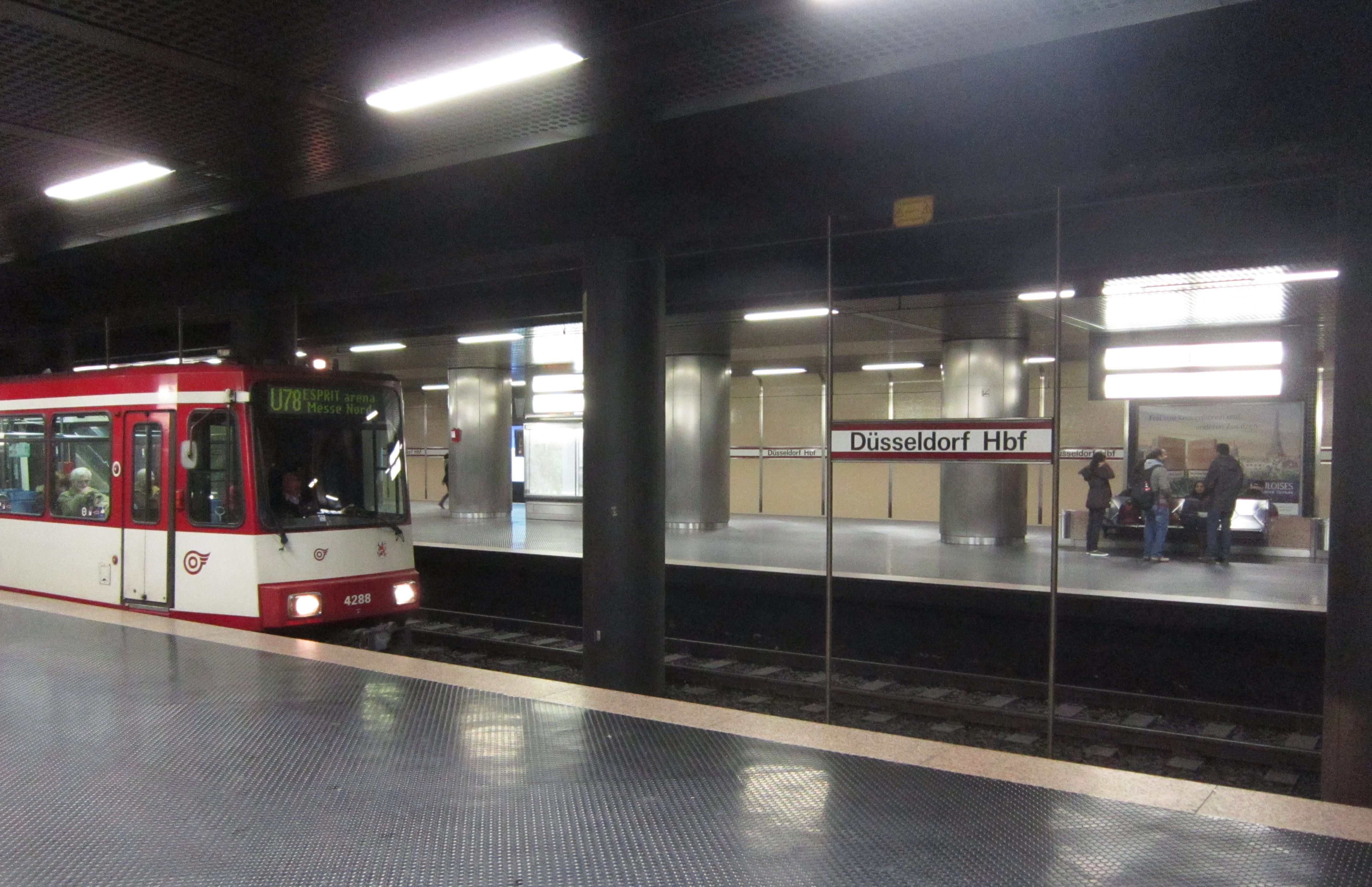 U-Bahnhof Düsseldorf Hauptbahnhof